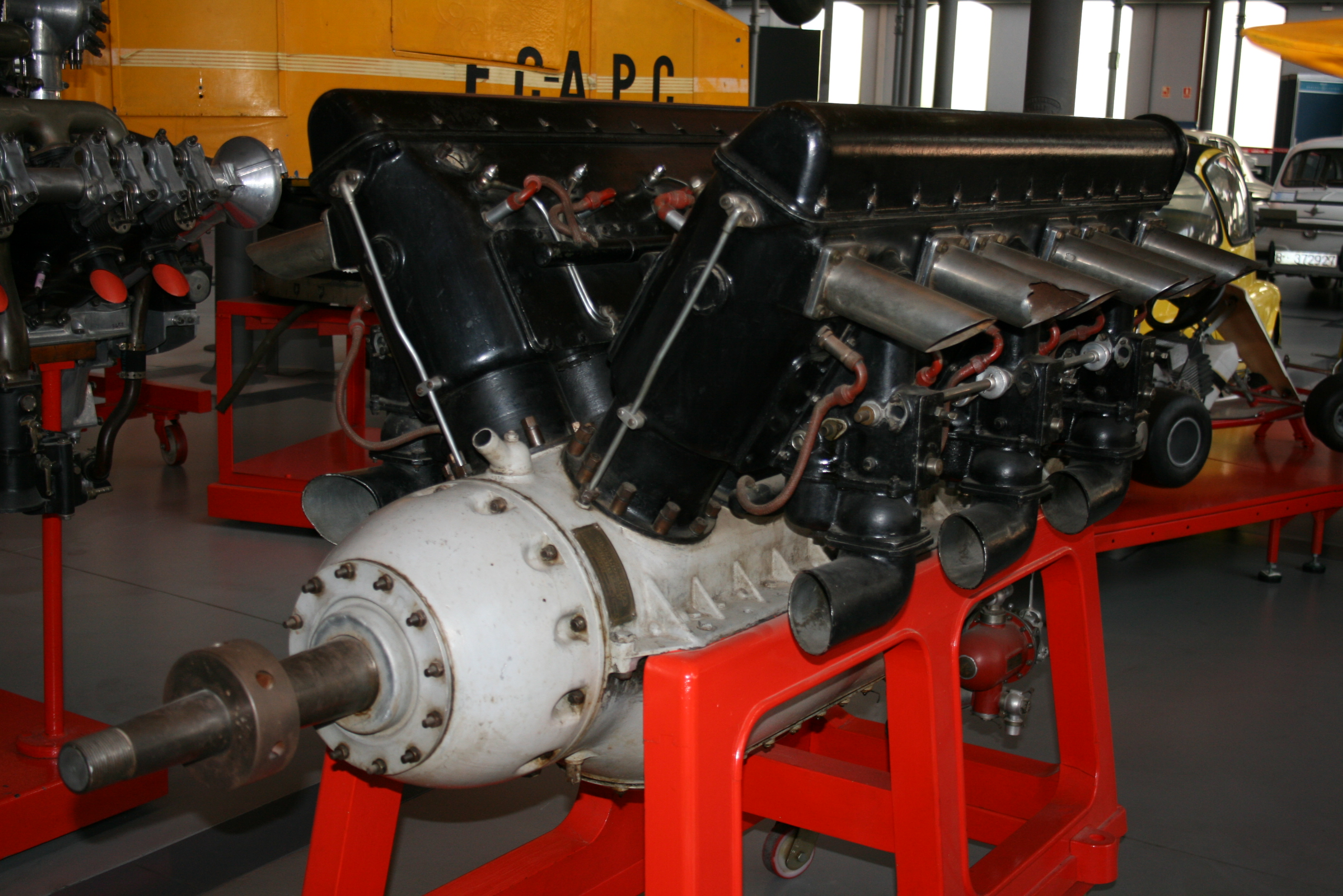 Motor Hispano Suiza 12 Lbr, fabricat en Barcelona en 1929. Exposat en el Museu de la Ciencia i la Tècnica de Catalunya